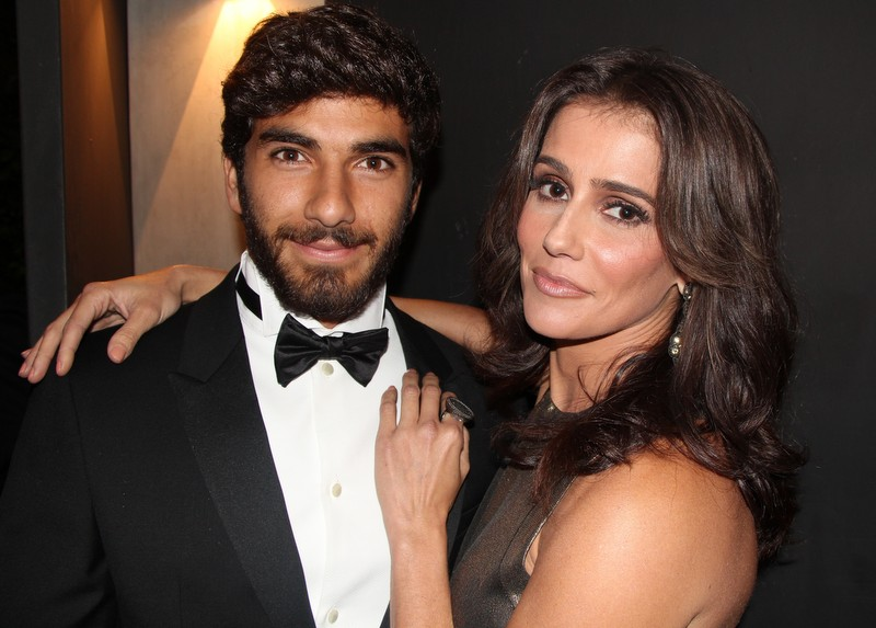 32 - Hugo Moura e Deborah Secco